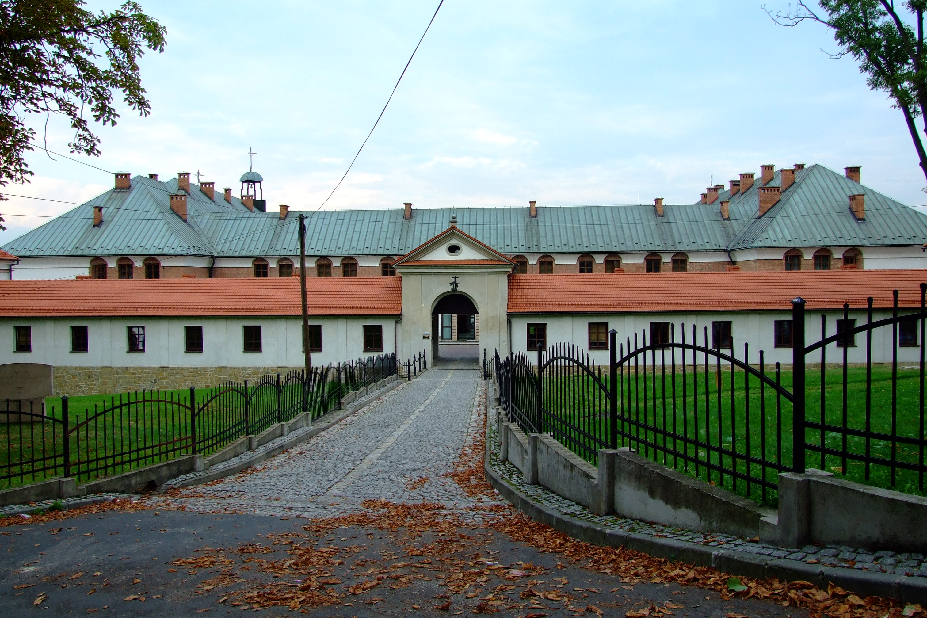 Sanktuarium pasyjno-maryjne w Kalwarii Zebrzydowskiej